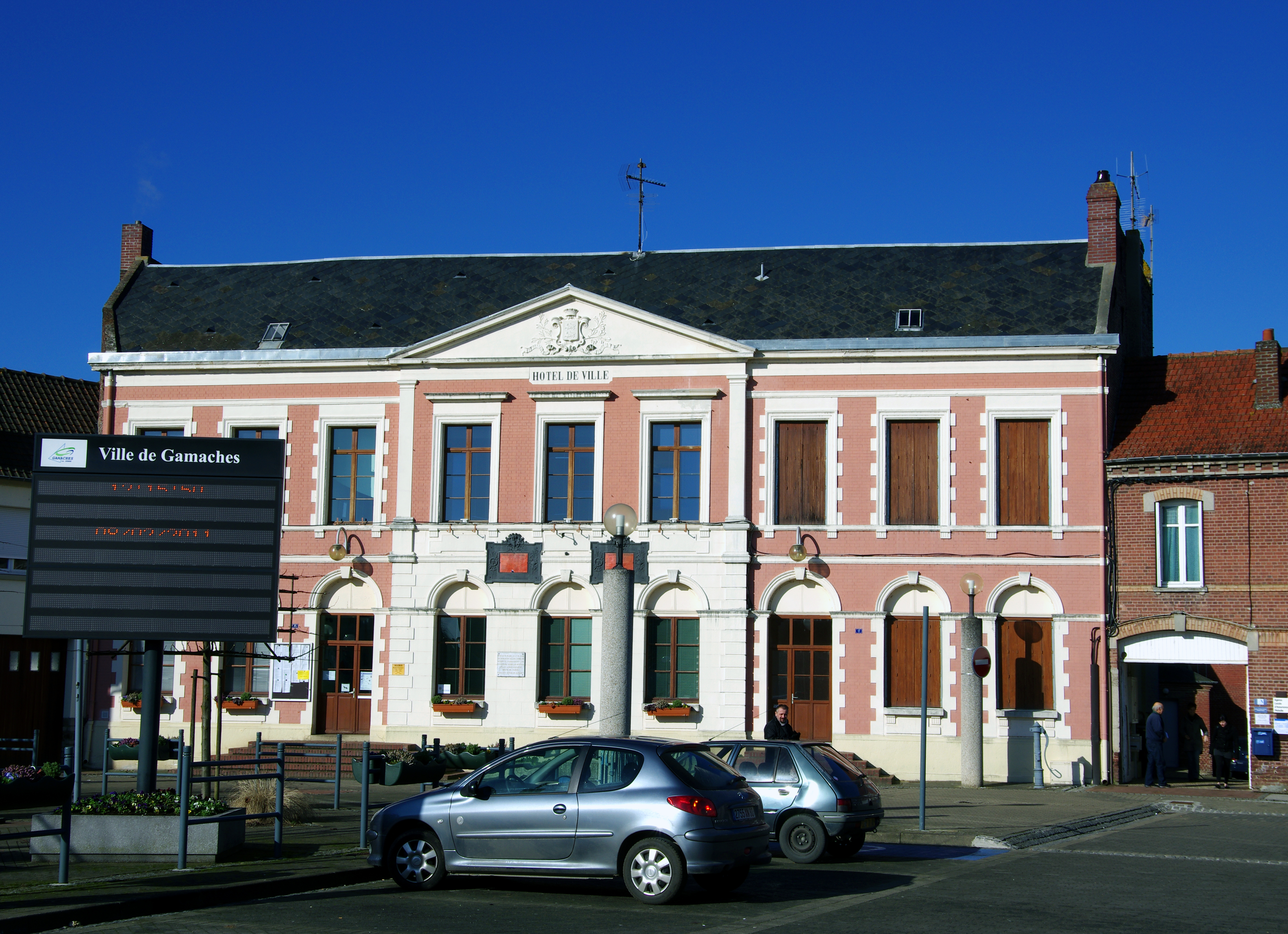 Gamaches (Somme, France) - L'hôtel-de-ville. .